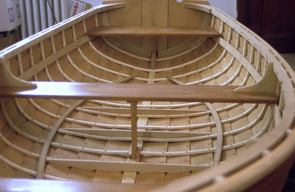 Innenansicht eines geklinkerten 3m-Dinghis vor dem Lackieren